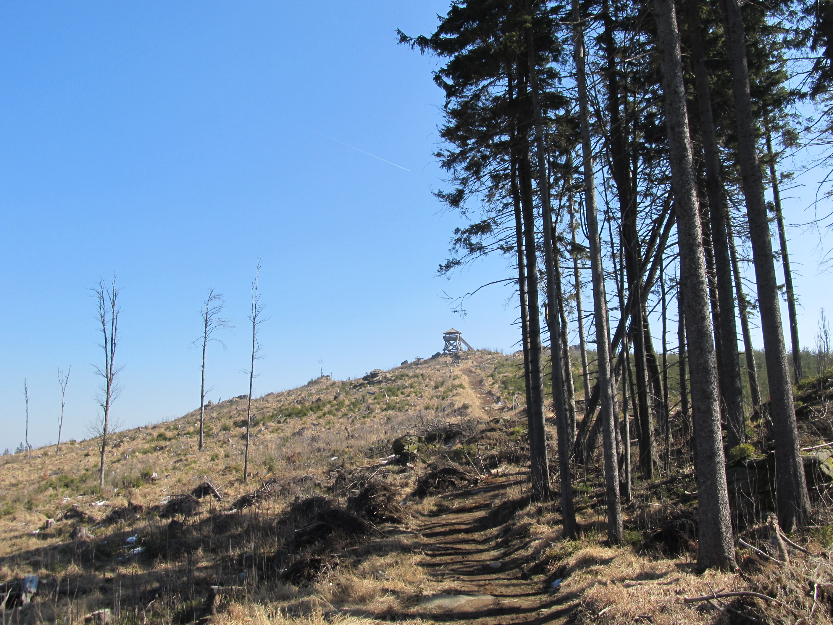 Knížecí stolec při sestupu na Skalky